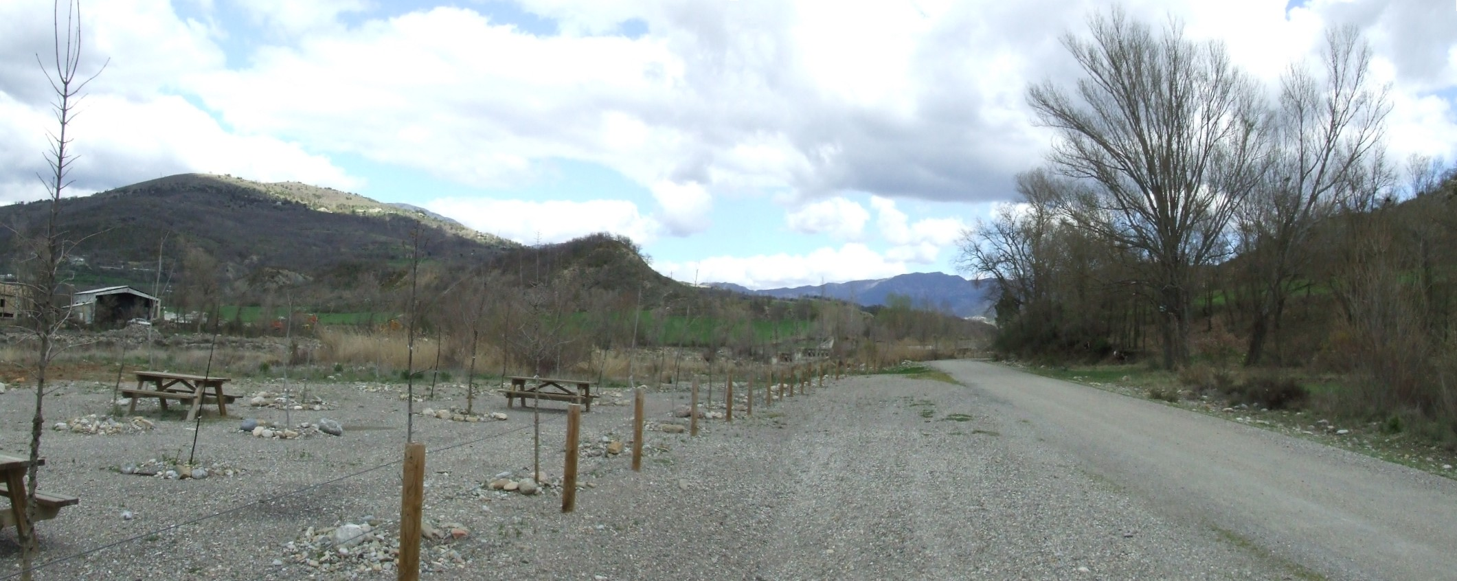 Panoràmica de la part final del barranc del Solà (Espluga de Serra, Tremp, Pallars Jussà)